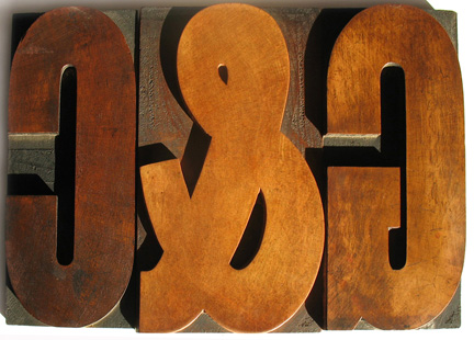 Grands caractères typographiques en bois. Hauteur : 21 cm, épaisseur typographique standard de 23 mm.